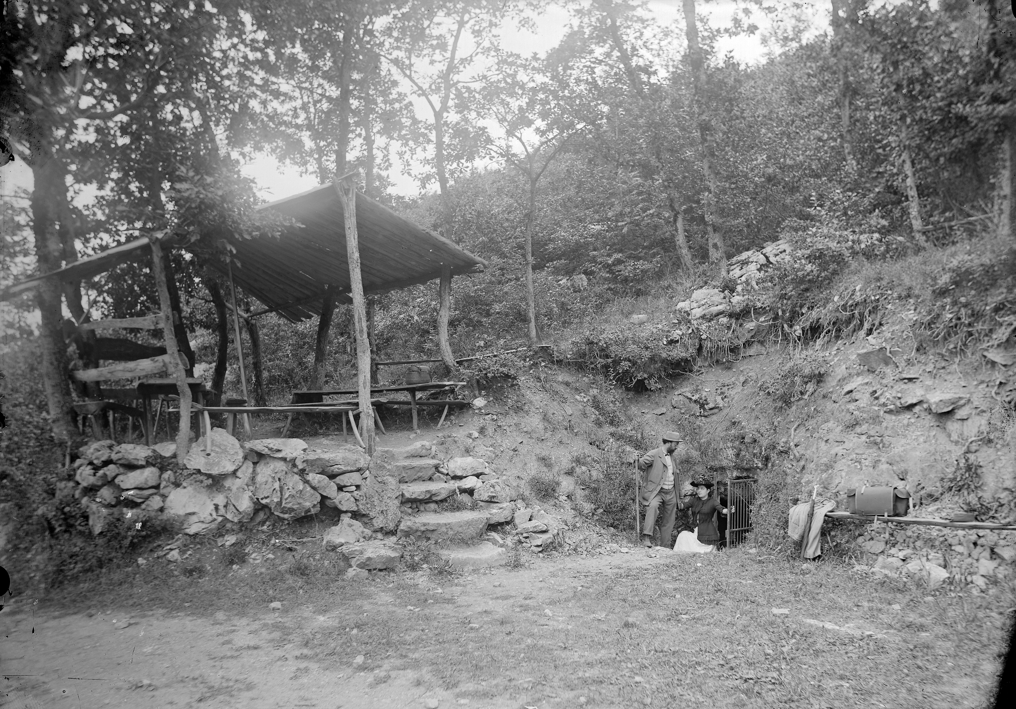 Félix Régnault sortant de la grotte de Gargas (65) - fouilles. Plaque négative au gélatino bromure d'argent, format 15x21 cm. Sans Inscription ni mention d'auteur